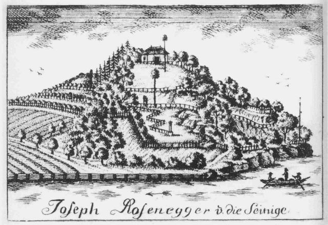 Visitenkarte der Familie Rosenegger mit der Anlage Bürglstein. Der Bürglstein ist ein kleiner Vorberg des Salzburger Kapuzinerbergs und befindet sich in der Altstadt (Äußerer Stein).